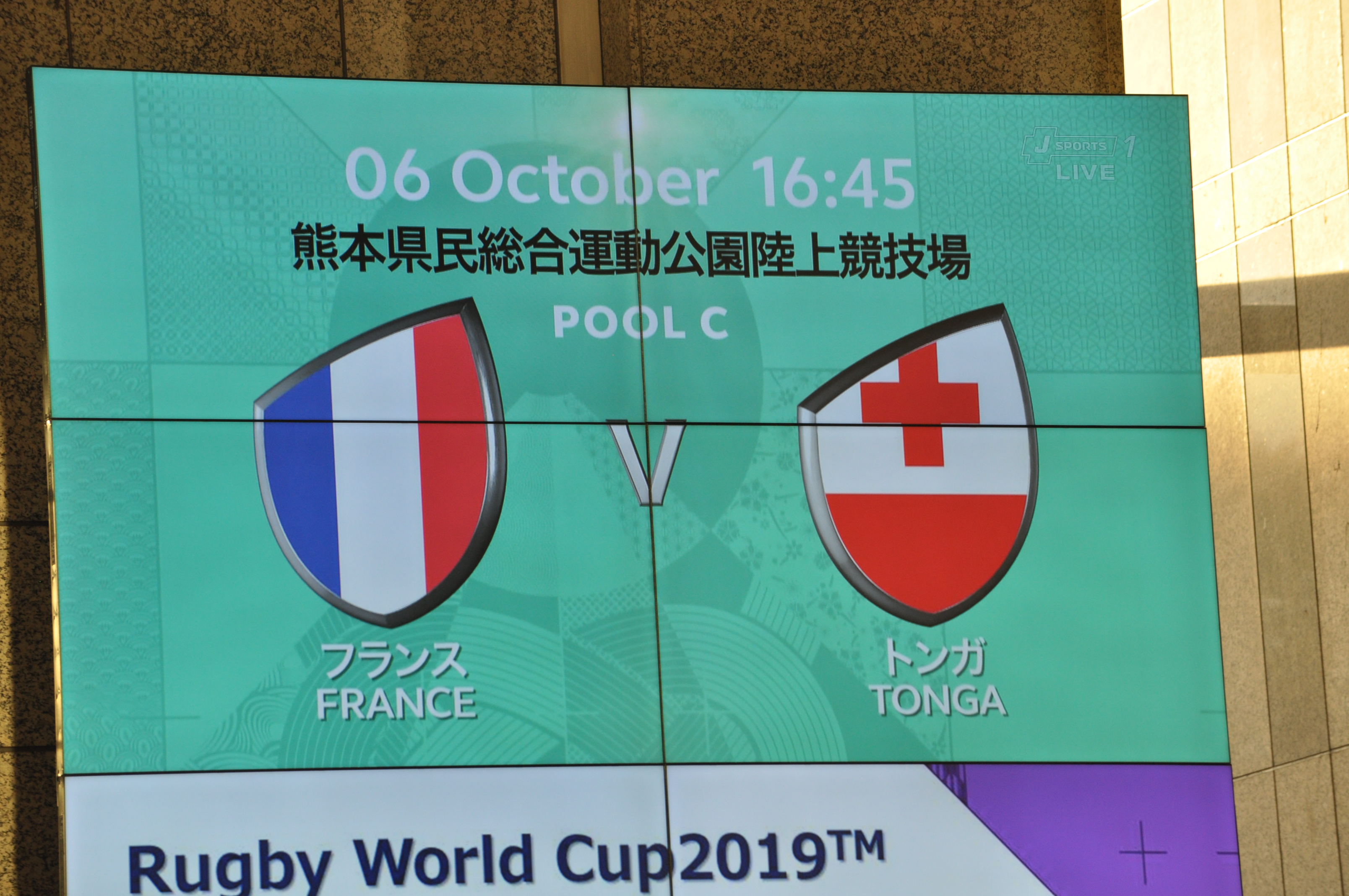 ラグビーワールドカップ2019